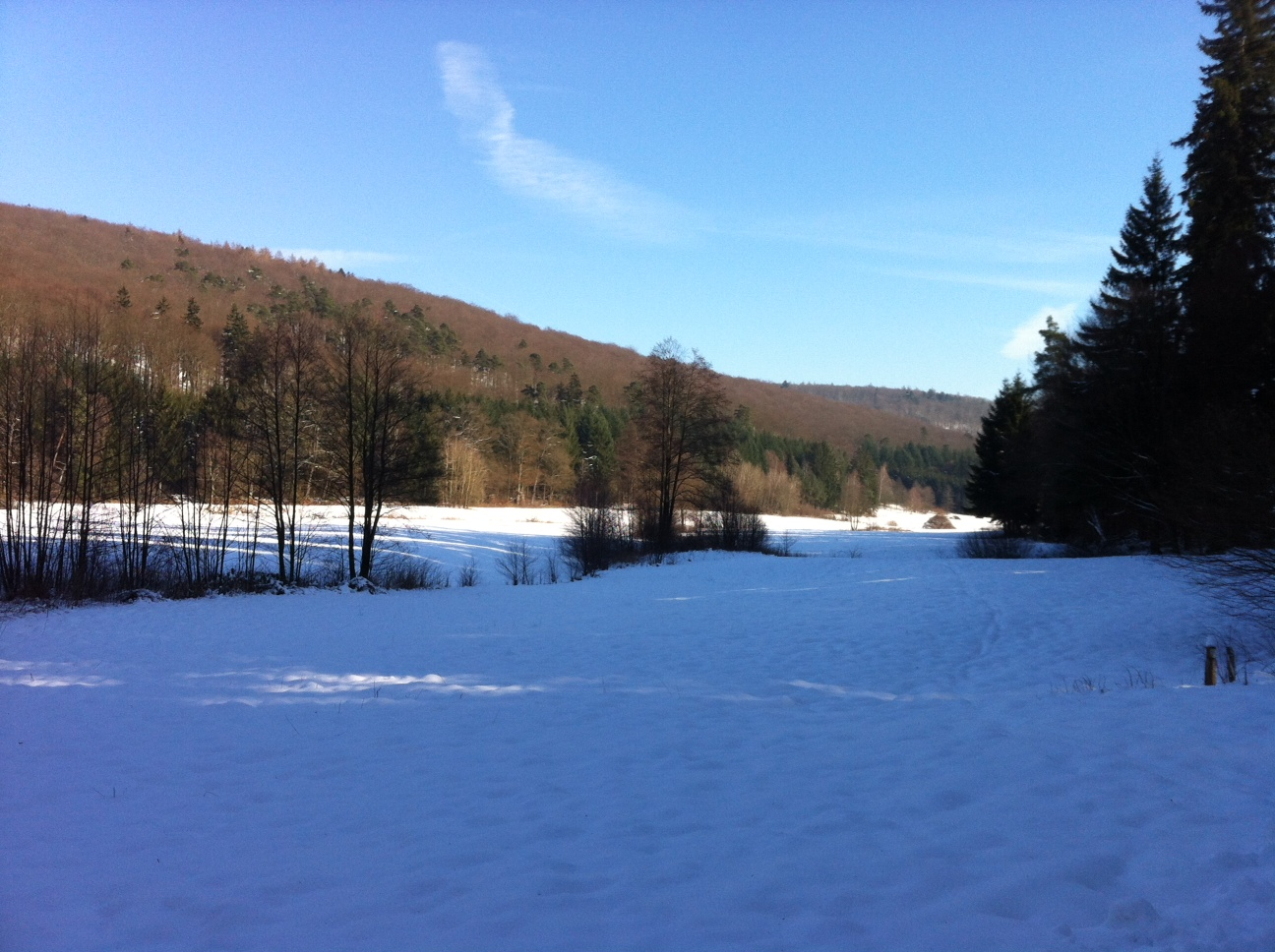 Weihersgrund